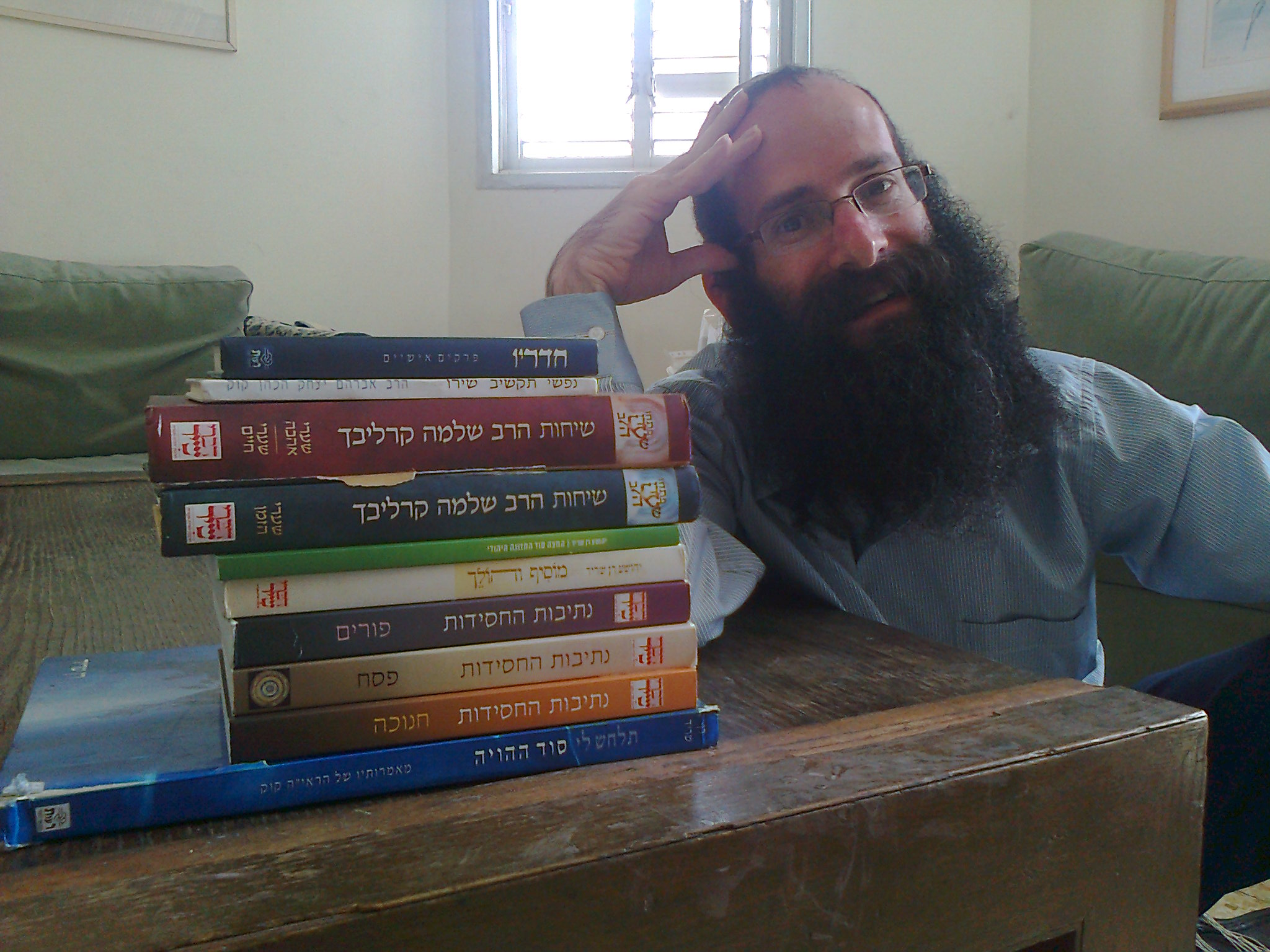 רן שריד וחלק מספריו